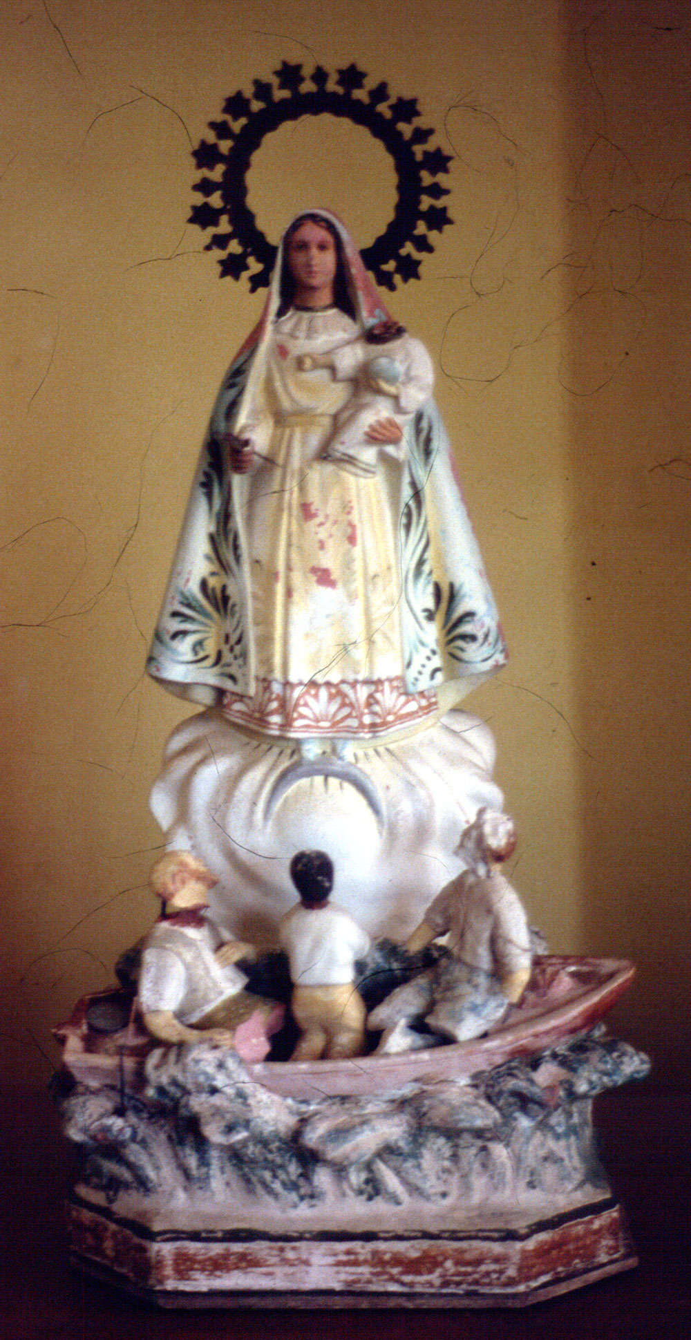 Virgen del Cobre (Barmherzige Jungfrau von El Cobre) - kubanische Nationalheilige, gleichzeitig Ochún in der Santería (Havanna, Kuba)